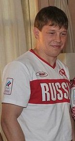 Российский дзюдоист Иван Нифонтов